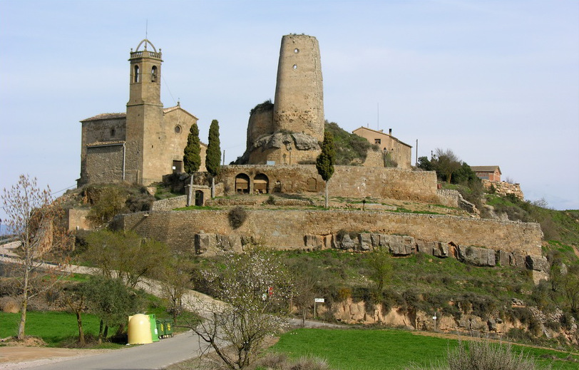 Castell de Lloberola (Biosca) Object location41° 53′ 20.74″ N, 1° 21′ 45.47″ E